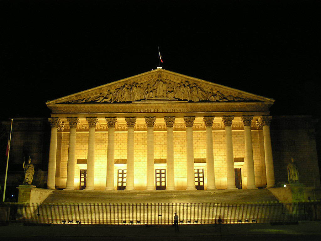 Le Palais Bourbon éclairé de nuit